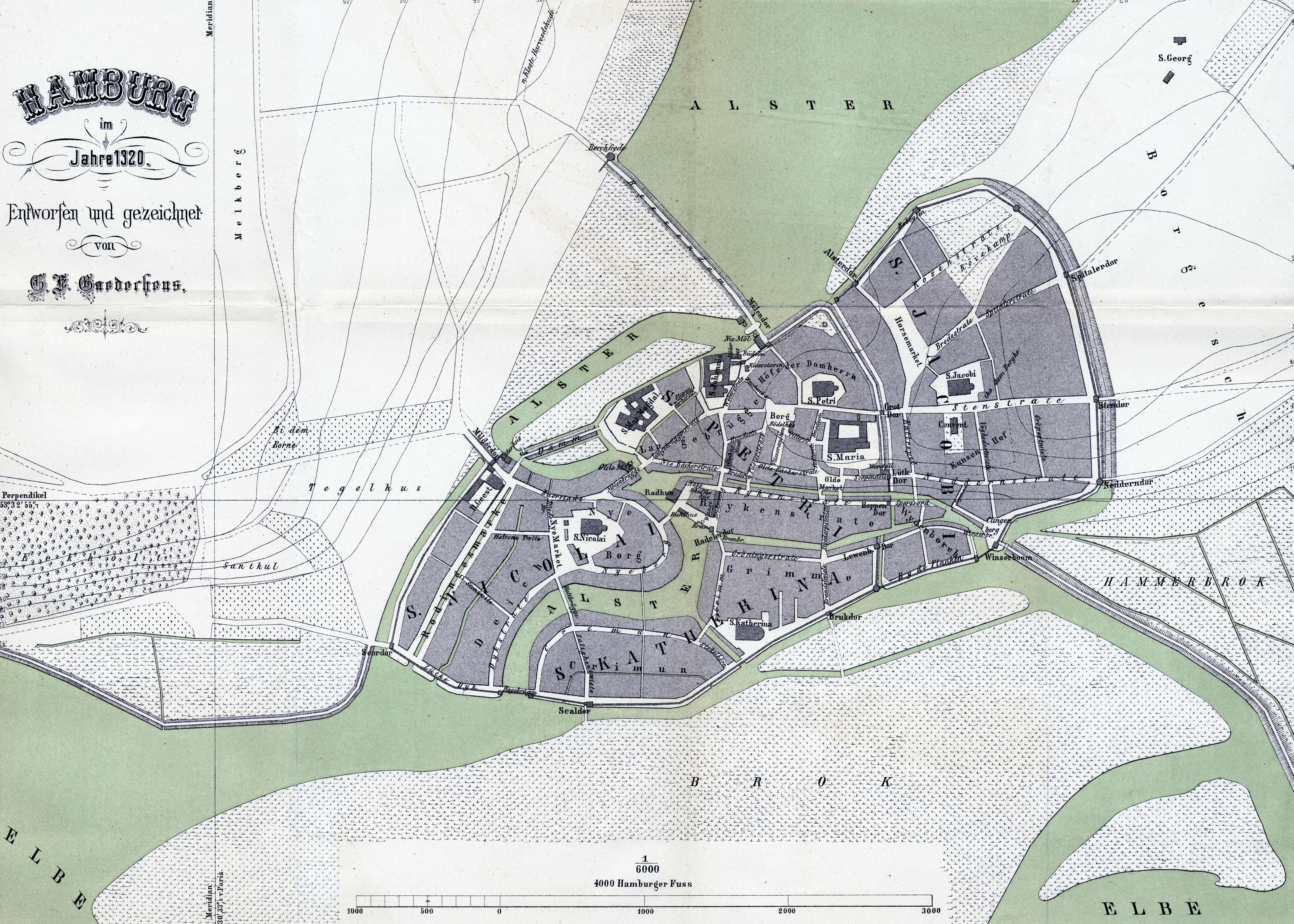 Karte des rekonstruierten Grundrisses von Hamburg im Jahre 1320